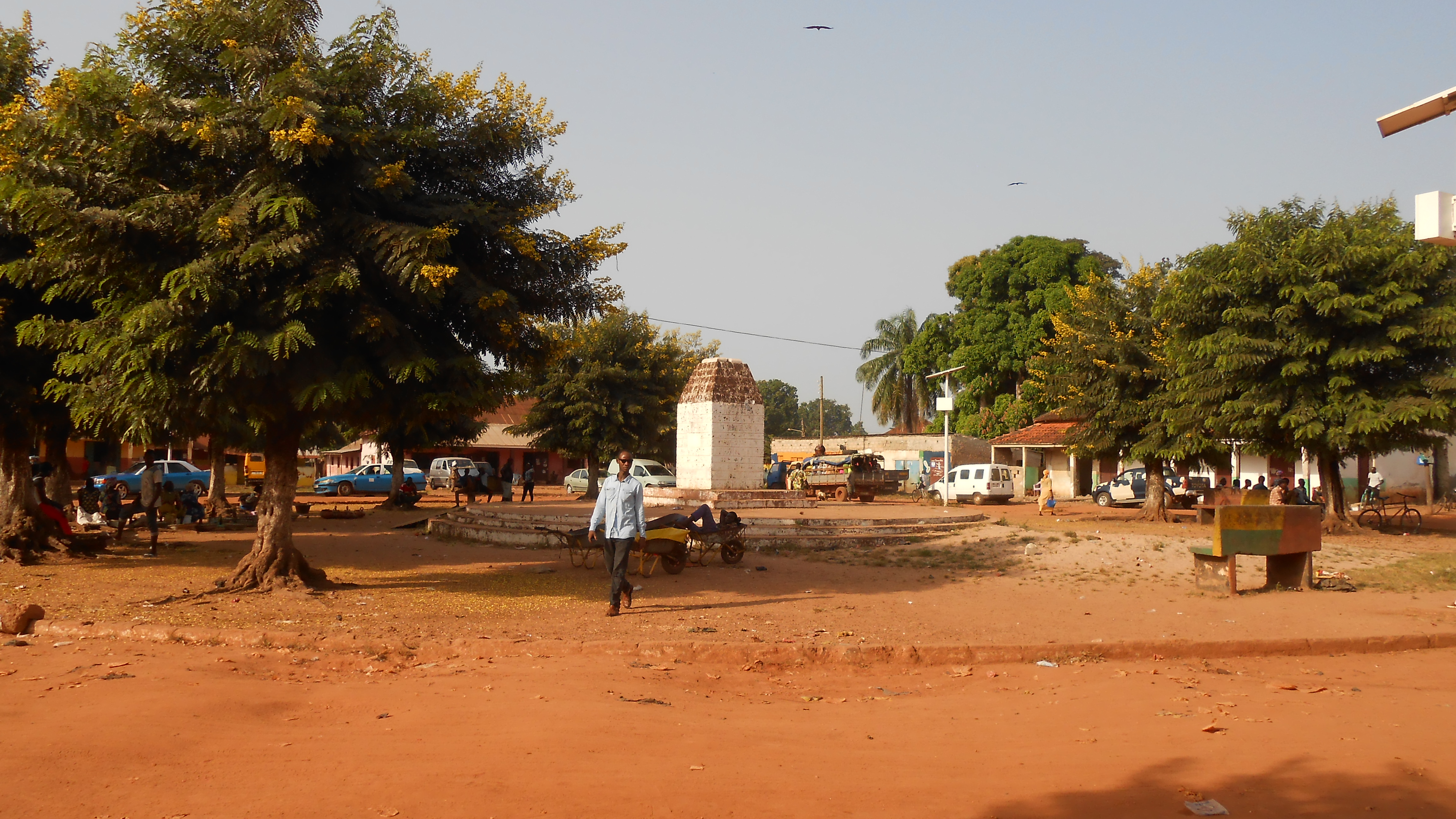 Praça no centro de Canchungo com o que resta do monumento a Teixeira Pinto, com a praça dos táxis no fundo.